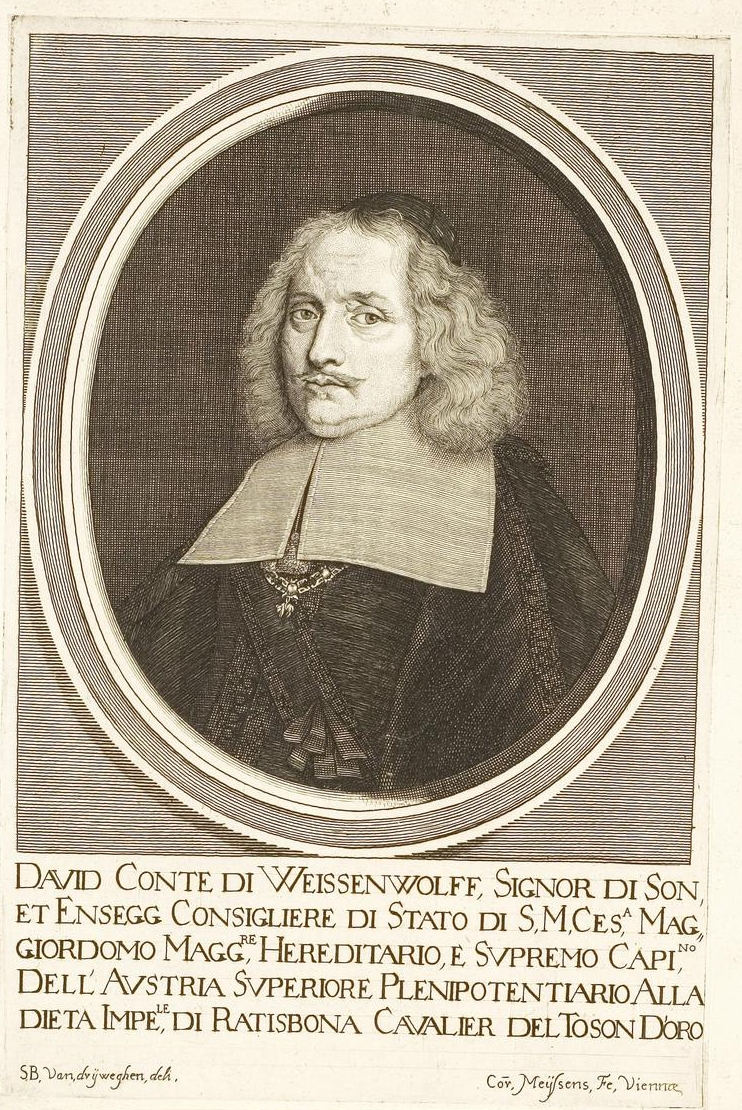 Grafik aus dem Klebeband Nr. 1 der Fürstlich Waldeckschen Hofbibliothek Arolsen Motiv: David zu Sonnegg von Ungnad von Weissenwolf (1604–1672), Österr. Staatsmann; Landeshauptmann von Oberösterreich GND: 117310107